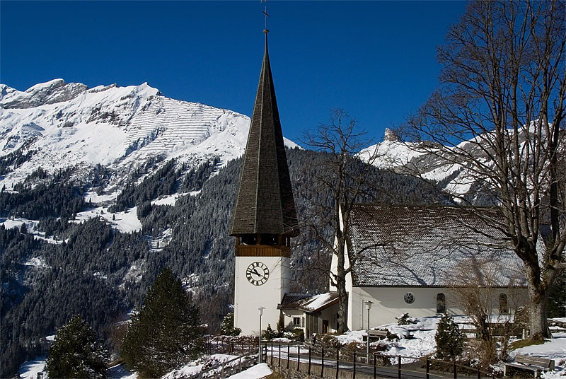 Kirche von Wengen, Kanton Bern, Schweiz